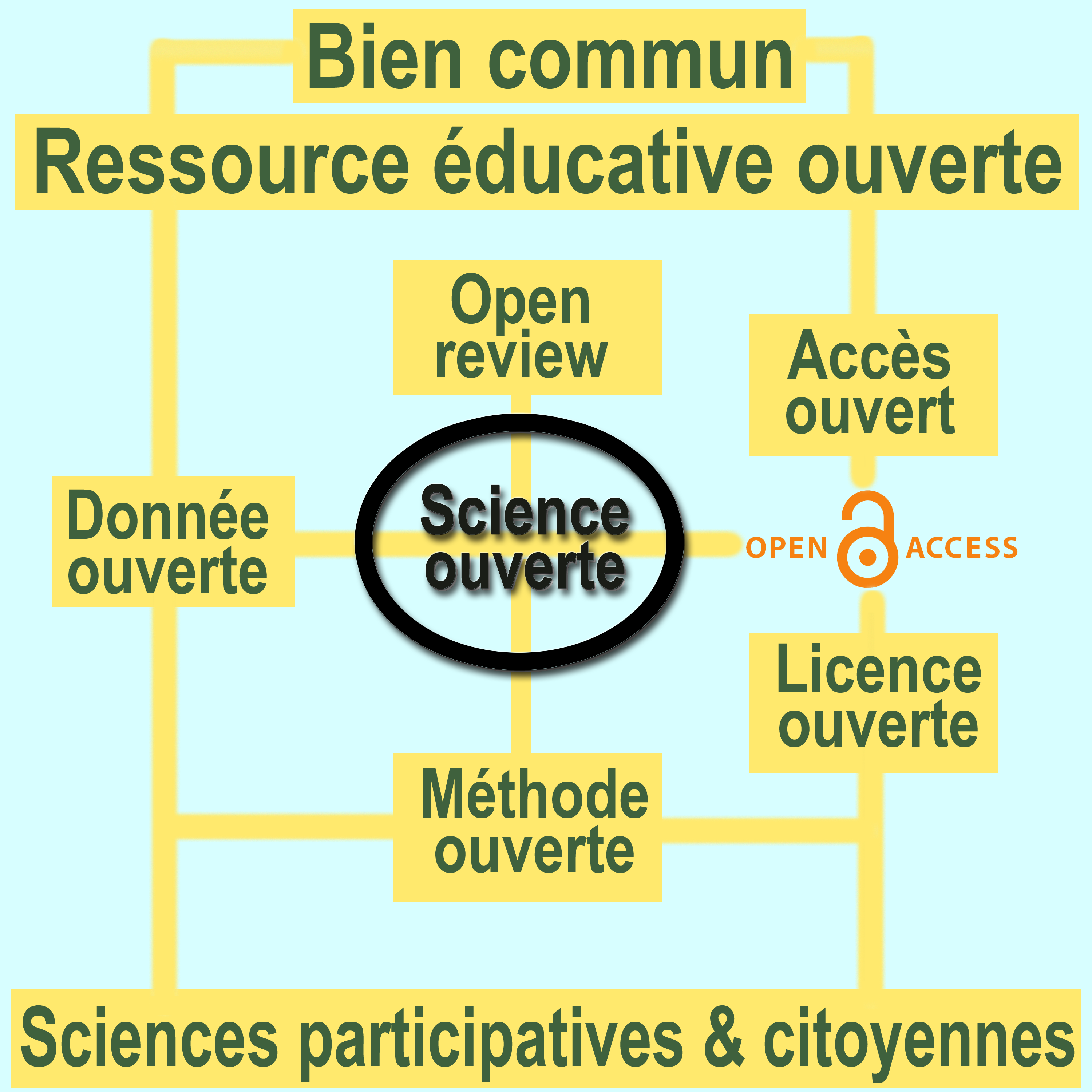 Positionnement de la notion de Science ouverte par rapport à des sujets connexes (Open data ; Open source ; Méthodologie ouverte ; Open review ; Open access ; Ressources éducatives ouvertes ; Sciences participatives & citoyennes